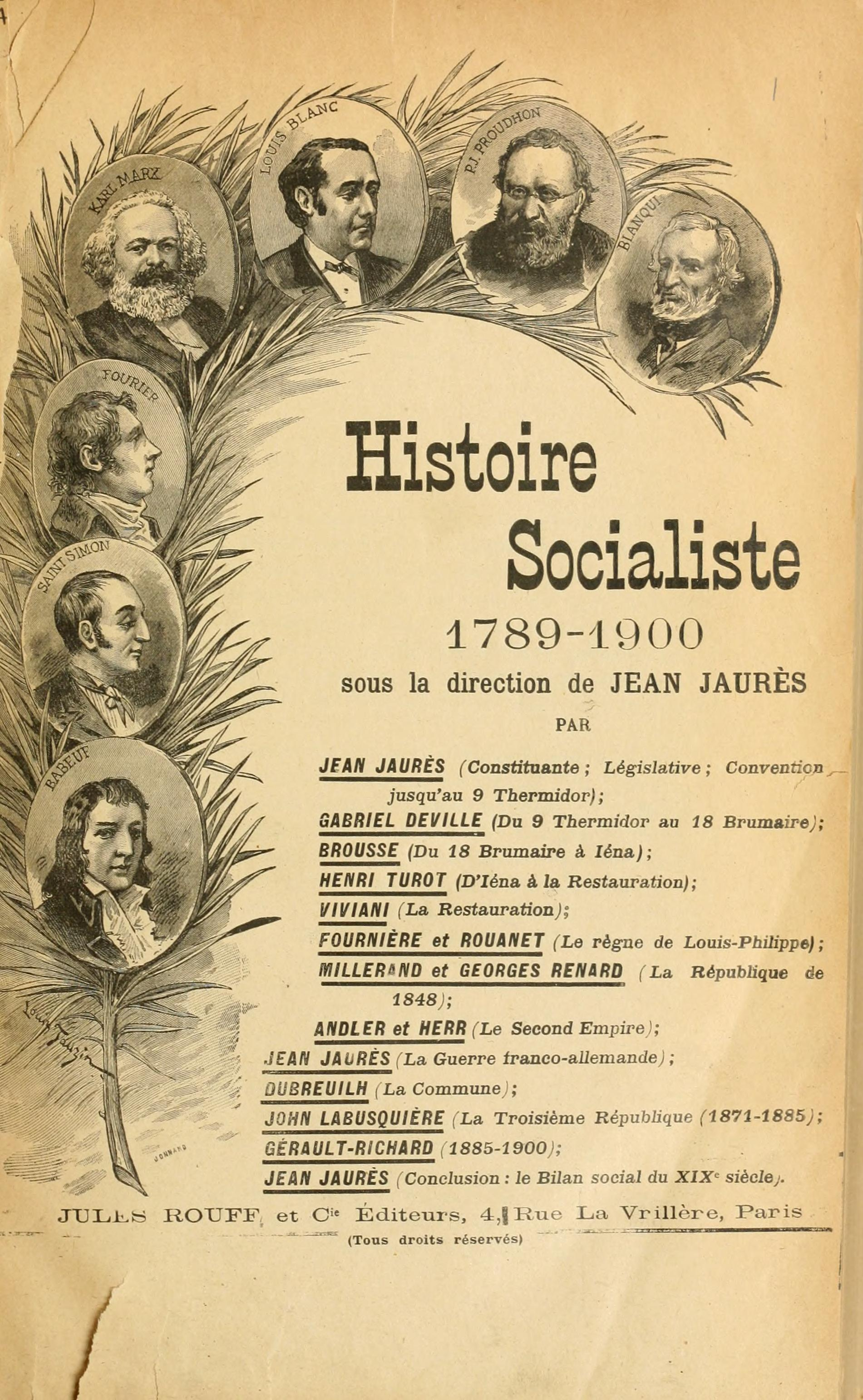 Illustration page 011 du volume I de l'ouvrage Histoire socialiste File:Jaurès - Histoire socialiste, I.djvu. Affiche prospectus de la collection.